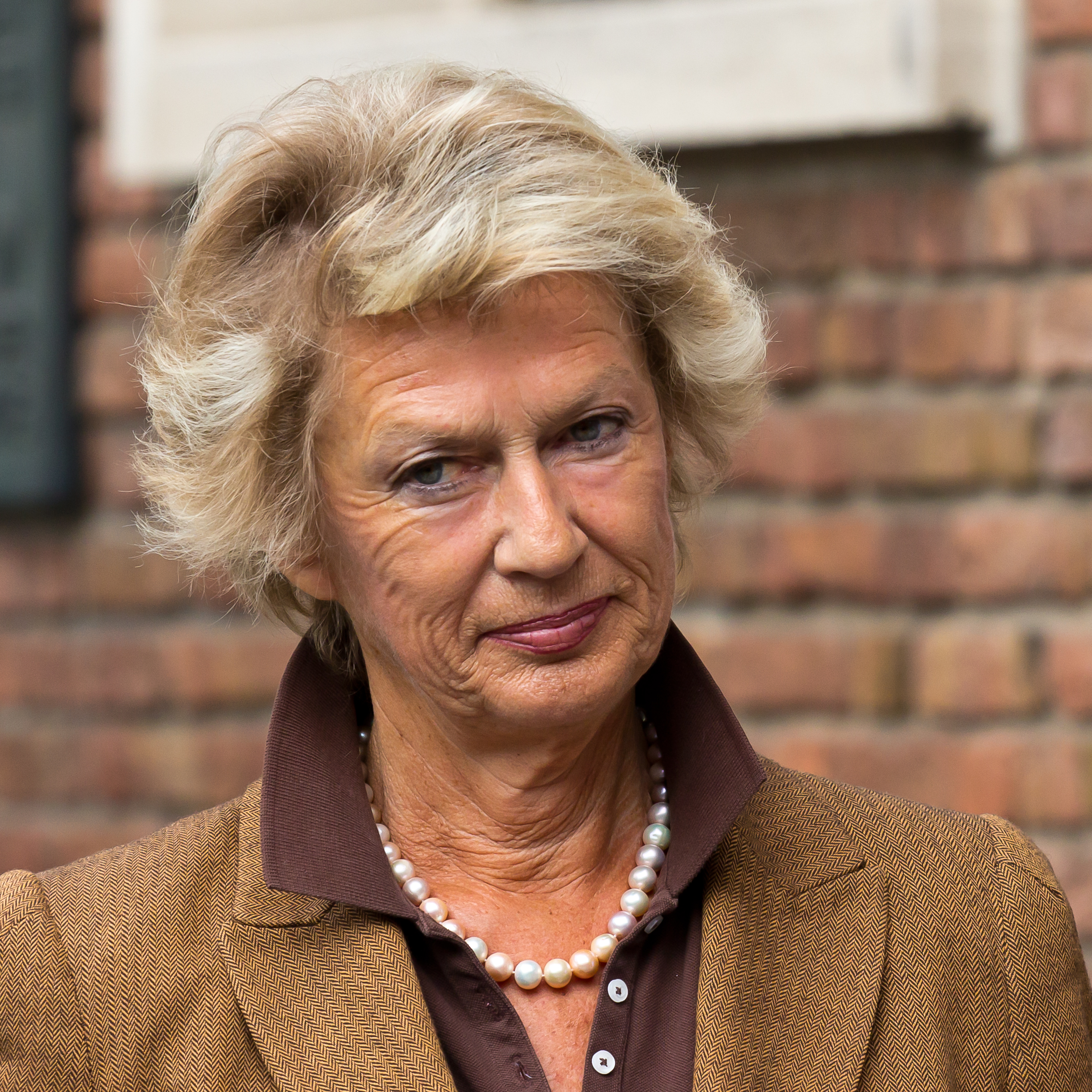 Am 6. September 2012 enthüllte der französische Botschafter Maurice Gourdault-Montagne, Oberbürgermeister Jürgen Roters und Konrad Adenauer, Enkel des früheren Bundeskanzlers, eine Gedenkplakette am Rathaus Spanischer Bau. Sie erinnert an den Besuch des ehemaligen französischen Staatspräsidenten Charles de Gaulle in Köln. Die Gedenkplakette hat Adenauers Enkel der Stadt Köln gestiftet. Foto: Petra Roth, ehemalige OB von Frankfurt am Main